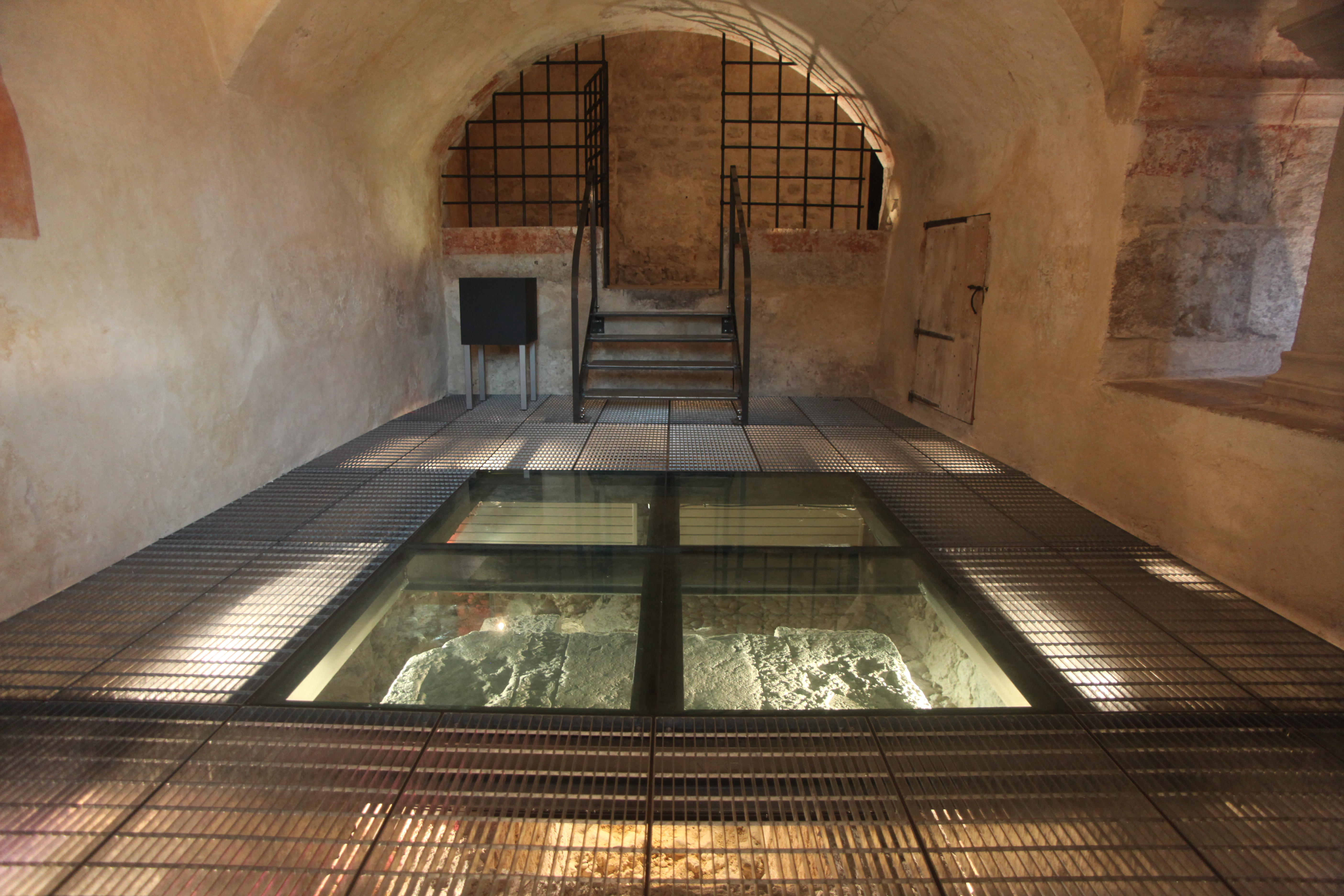 Chapelle de Claude Venet au musée de l'Abbaye à Saint-Claude (Jura).